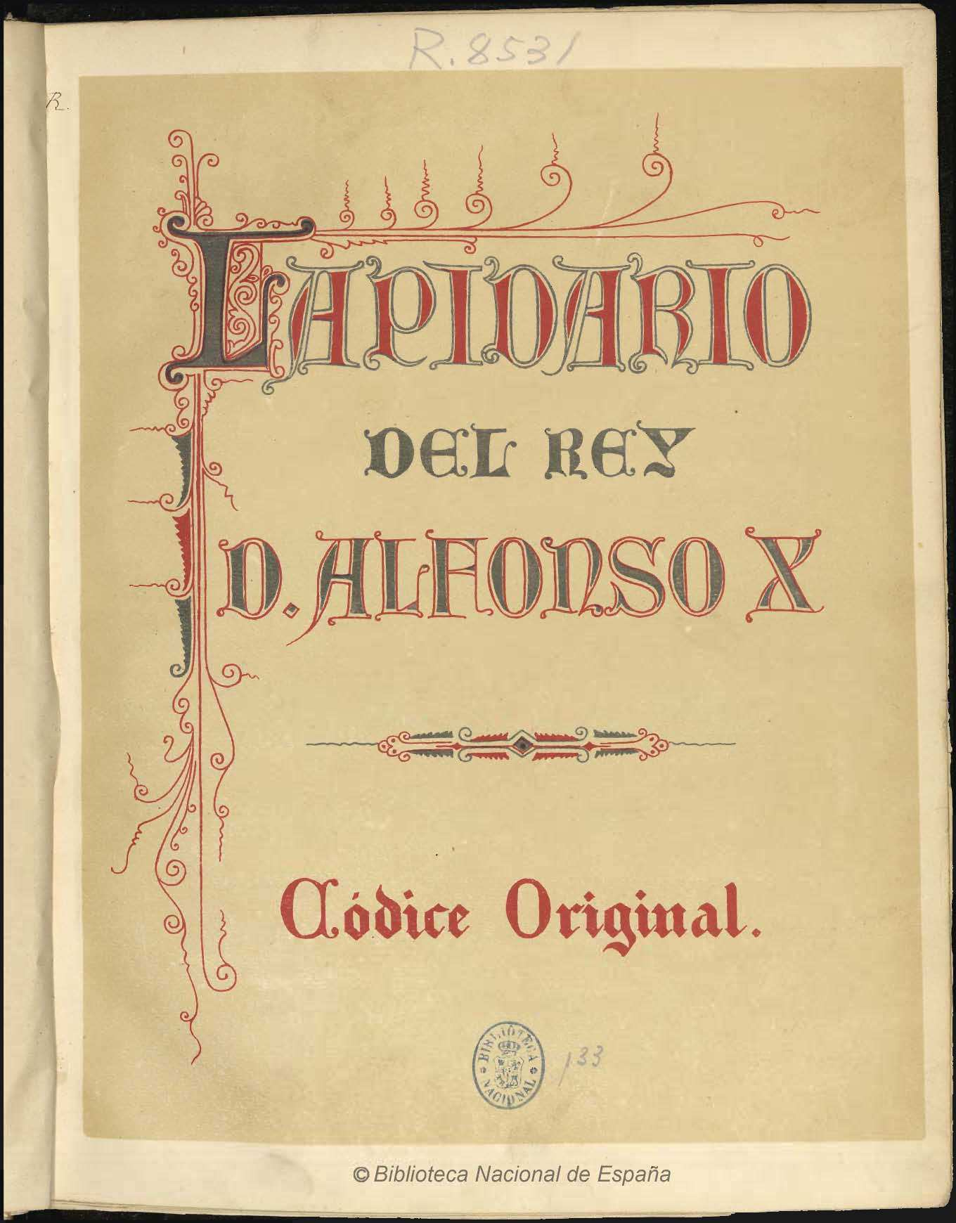 Lapidario del Rey D. Alfonso X : códice original [con un prólogo de José Fernández Montaña] Autor: Alfonso X, Rey de Castilla ; Fernández Montaña, José (1842-1936) Fecha: 1881 Datos de edición: [S.l.] [s.n.] Madrid Imp. de la Iberia, a cargo de J. Blasco